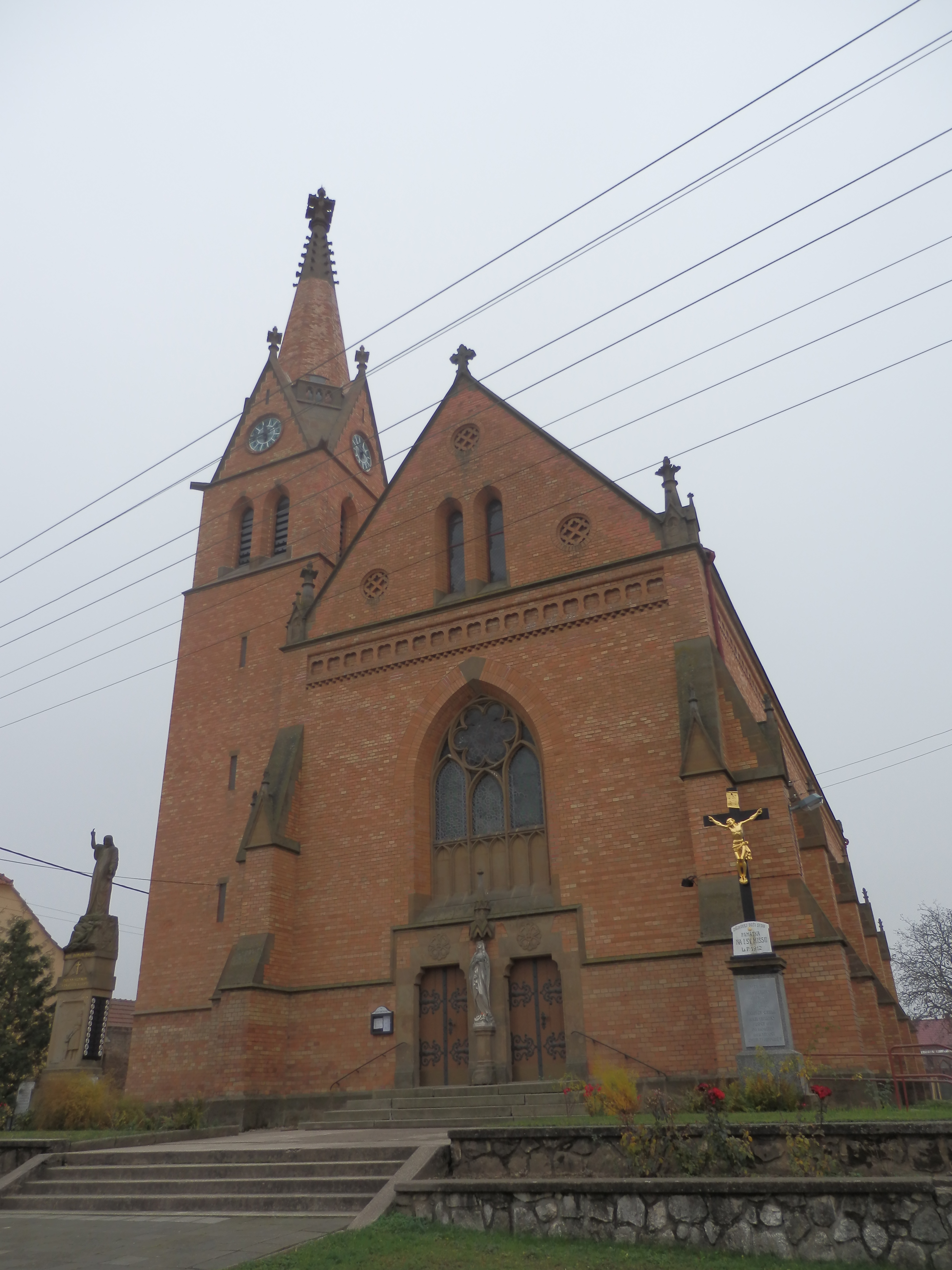 Kostel sv. Jana Křtitele (Uherčice), Uherčice